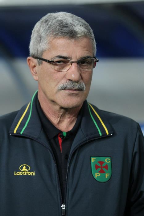 Мистер Калисто на матче с ФК Днепр